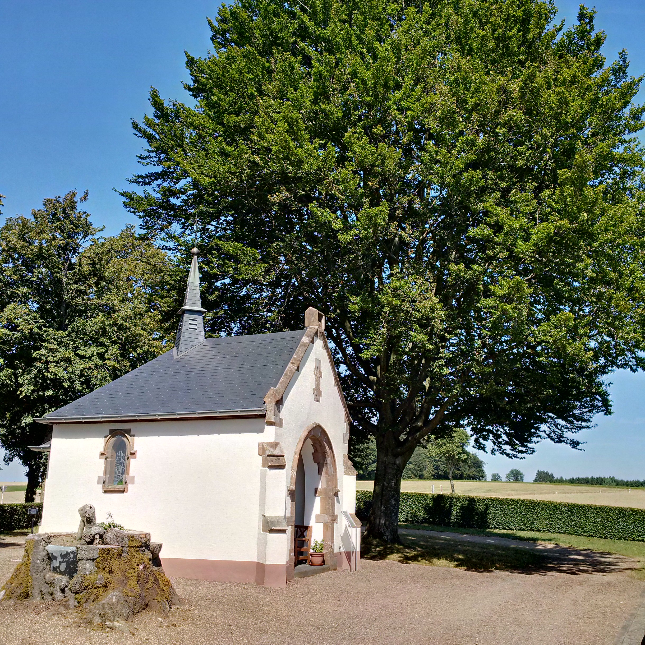 Kapell op der Wolwener Klaus; Vir lénks am Bild, d'Iwwerreschter vun der Buch op der Wolwener-Klaus